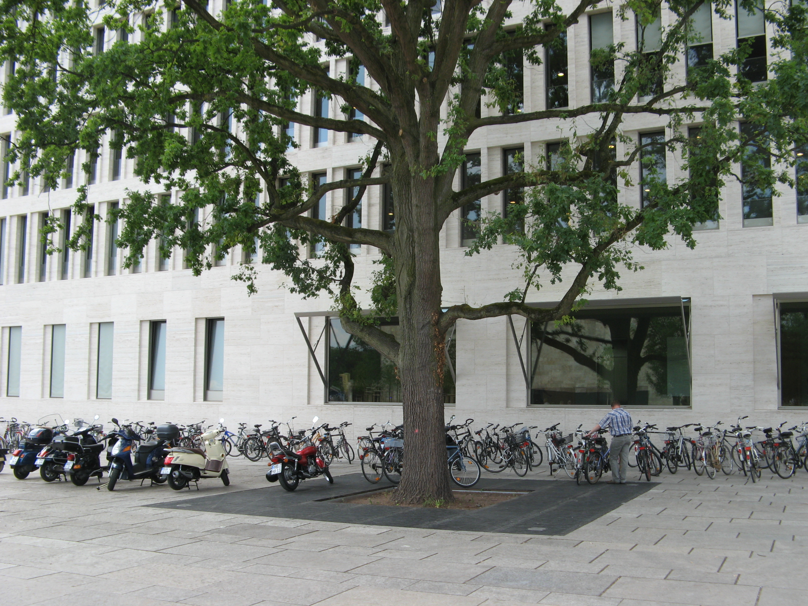 Bestandsbaumschutz durch ein Baumschutzsystem an der Johann Wolfgang Goethe-Universität in Frankfurt